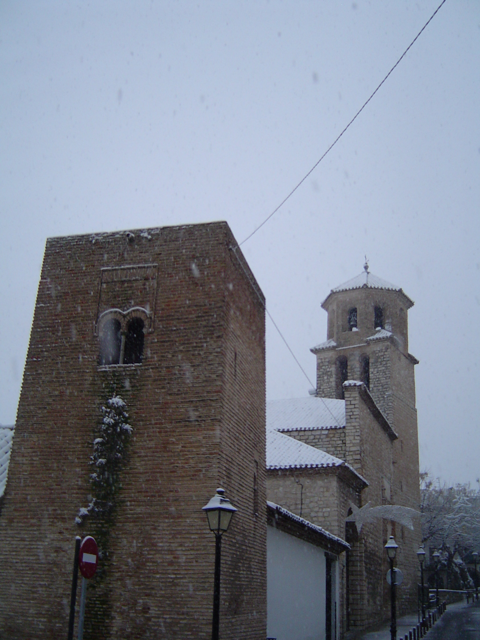 Exterior de la Iglesia de la Magdalena en Jaén